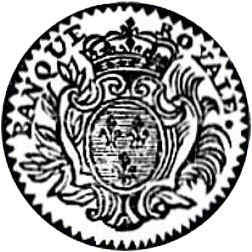 Sceau de la Banque royale de France, établit par décret en 1719.